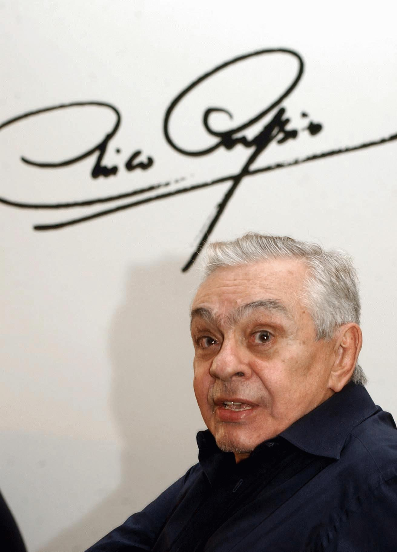 9435 Brasília - O humorista Chico Anysio abre exposição de pintura na LBV.